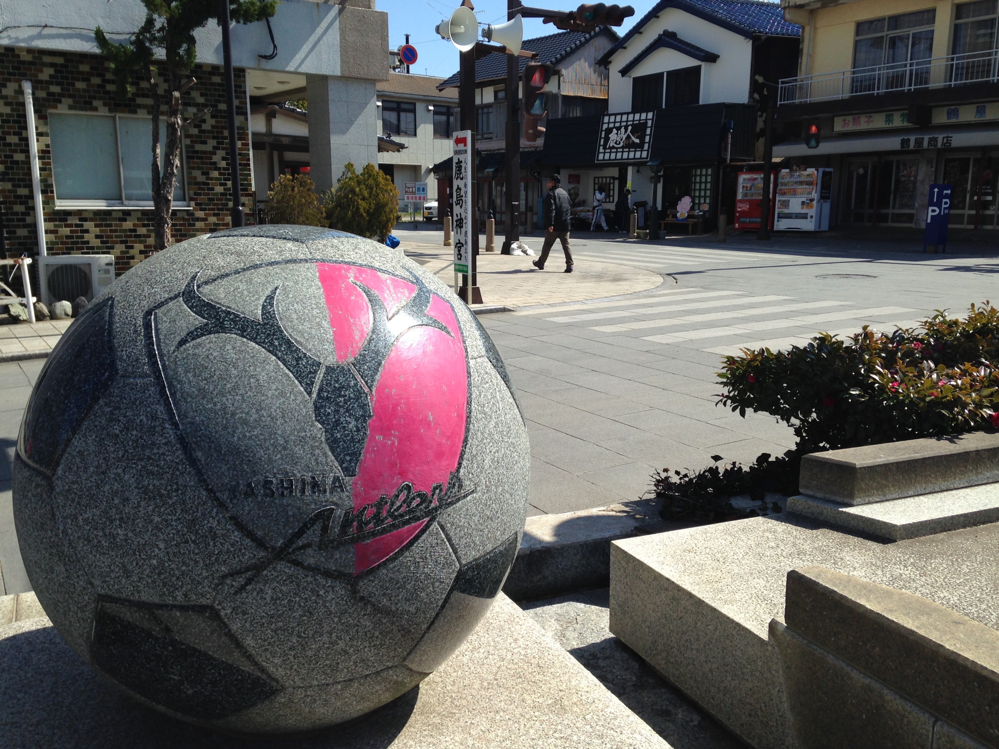 鹿島神宮参道にある鹿島アントラーズの記念碑